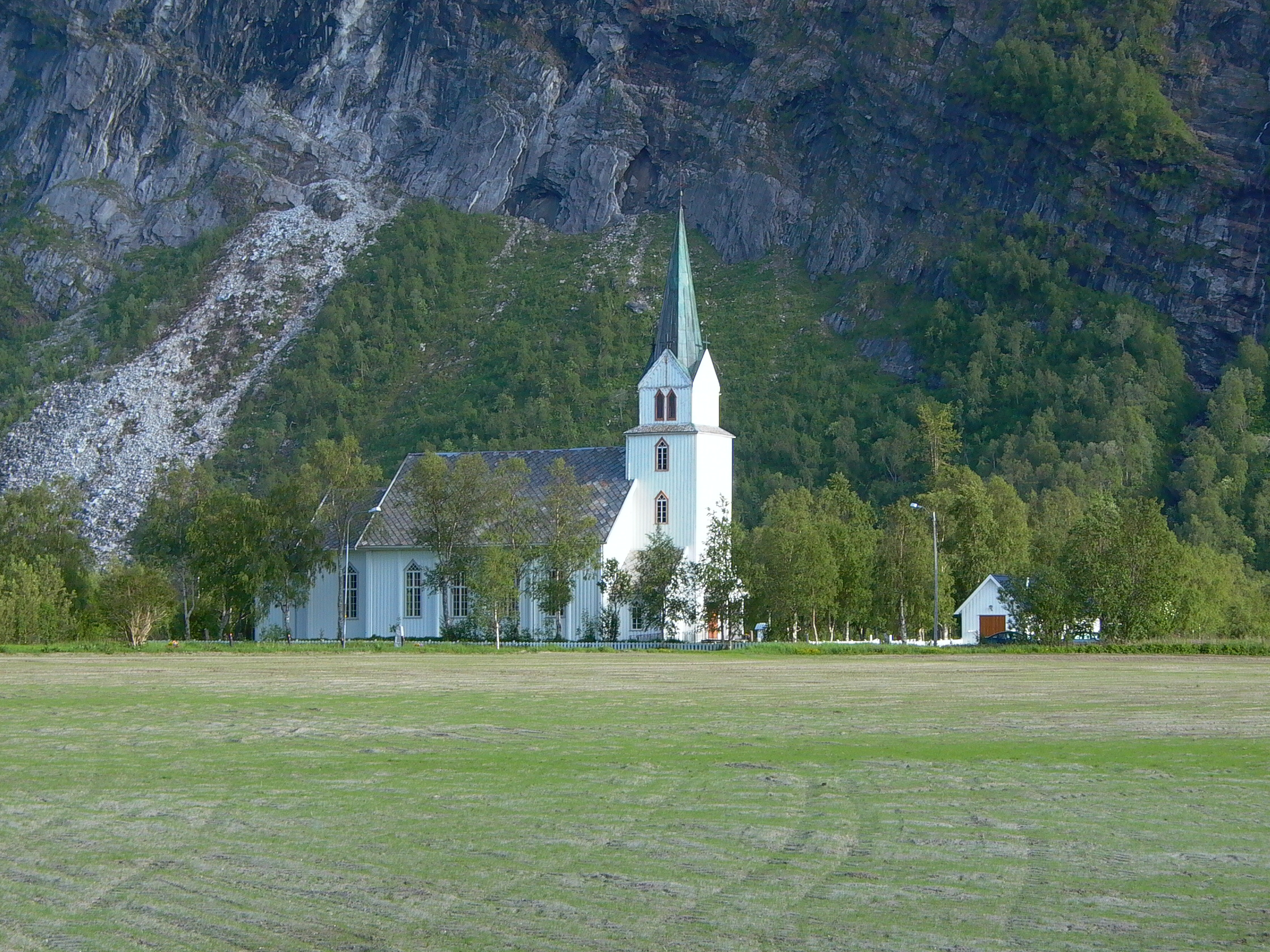 Beiarn kirke i Beiarn i Nordland, sett fra nordvest, om sommeren.